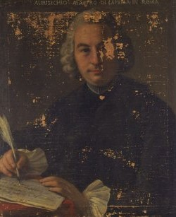 Anonimo, Ritratto di Antonio Aurisicchio. Sul fronte, in alto: AURISICHIO MASTRO DI CAPELLA IN ROMA. Sul retro: (AURISICHIO ANTONIO MAESTRO CANTI CADERE)